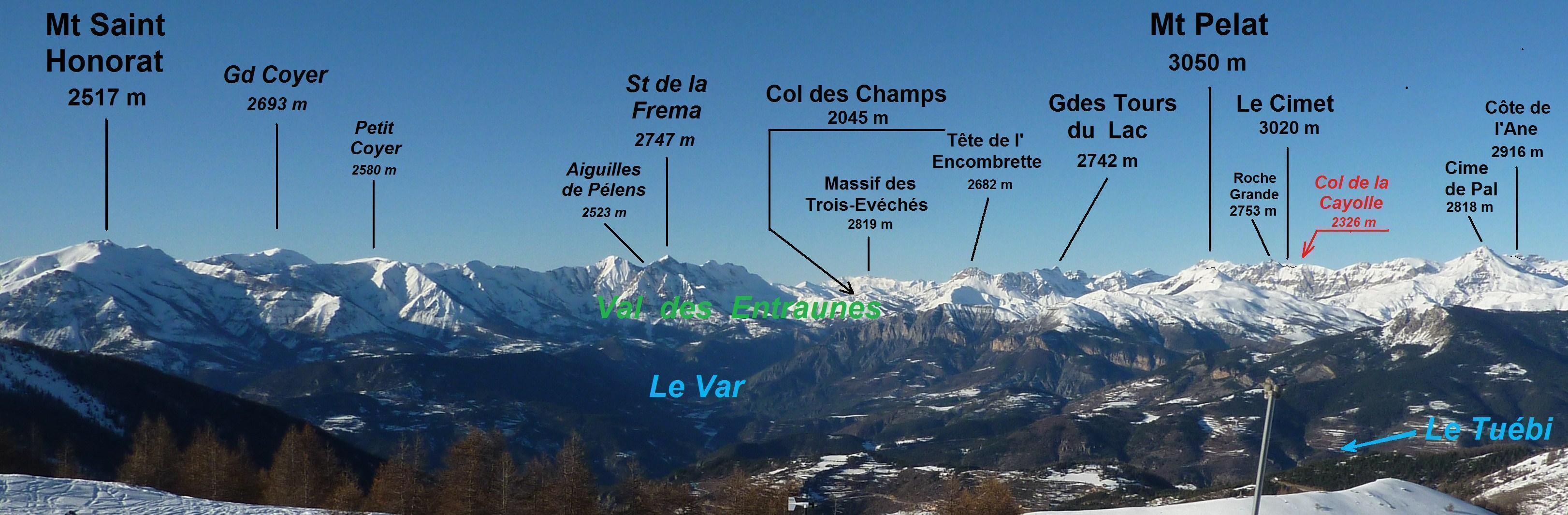 Panorama légendé du massif du Pelat vu du sud-est à partir des pistes de ski de l'Adrech de Forche (Dreccia - 2011 m) au sud de la station de Valberg (06 - FRANCE).